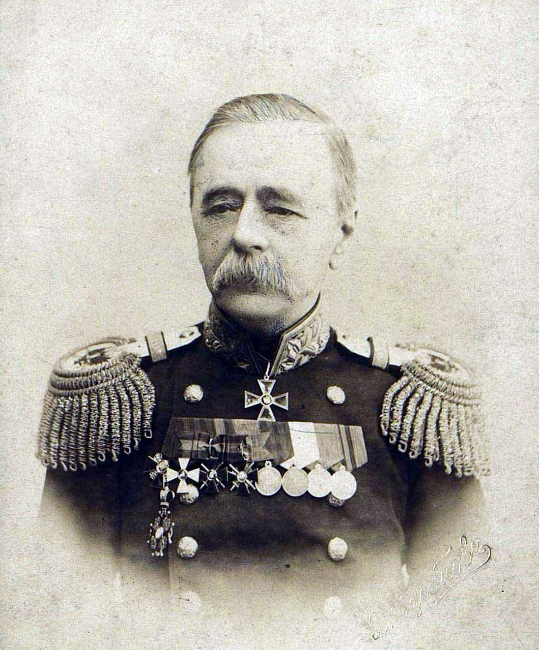 Русский адмирал Пётр Любимович Жерве. Это изображение было использовано для иллюстрирования статьи «Жерве» опубликованной в десятом томе «Военной энциклопедии», который был издан книгоиздательским товариществом И. Д. Сытина в 1912—1913 гг. в столице Российской империи городе Санкт-Петербурге.